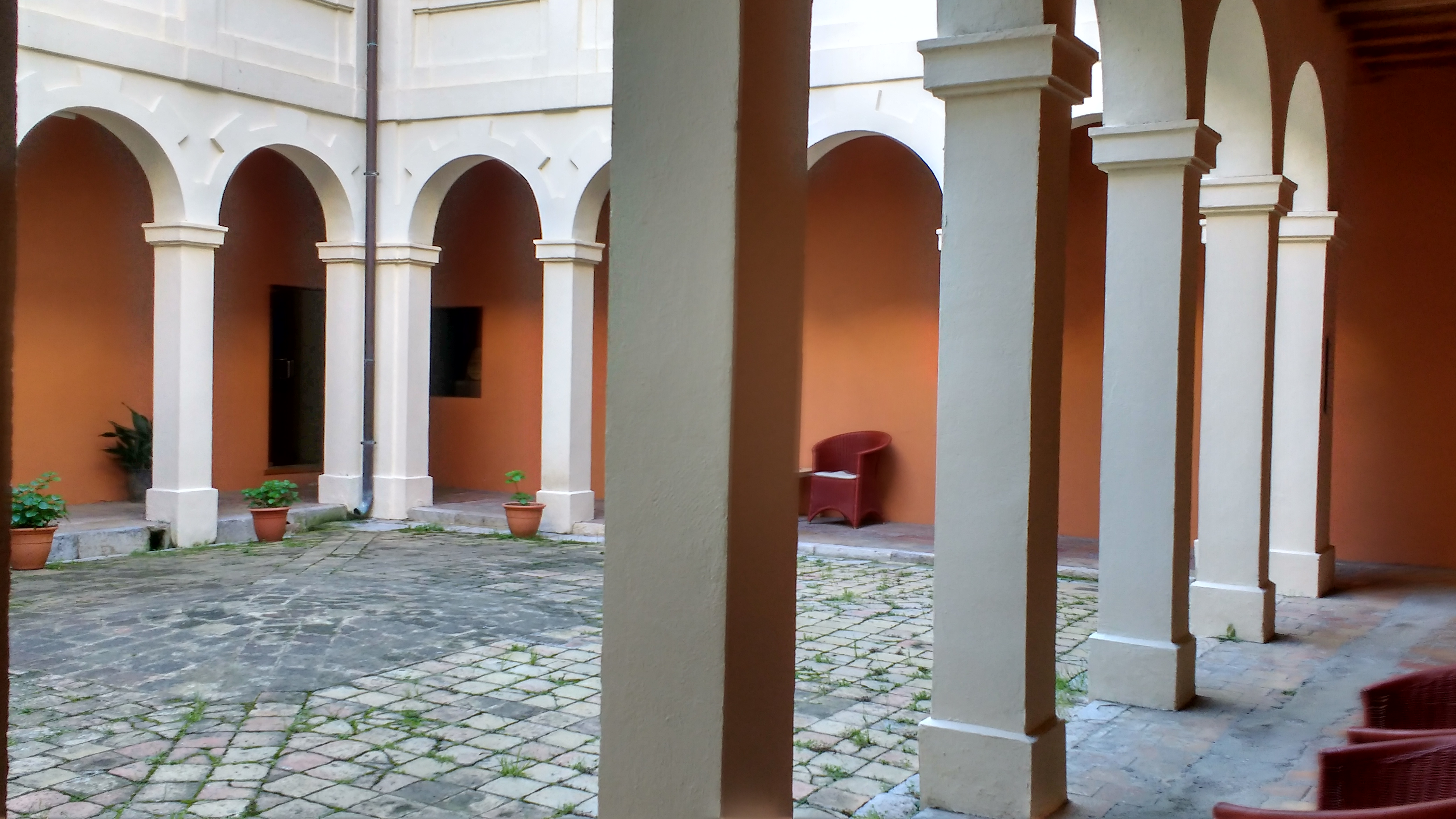 Claustre, sostre de la cisterna.